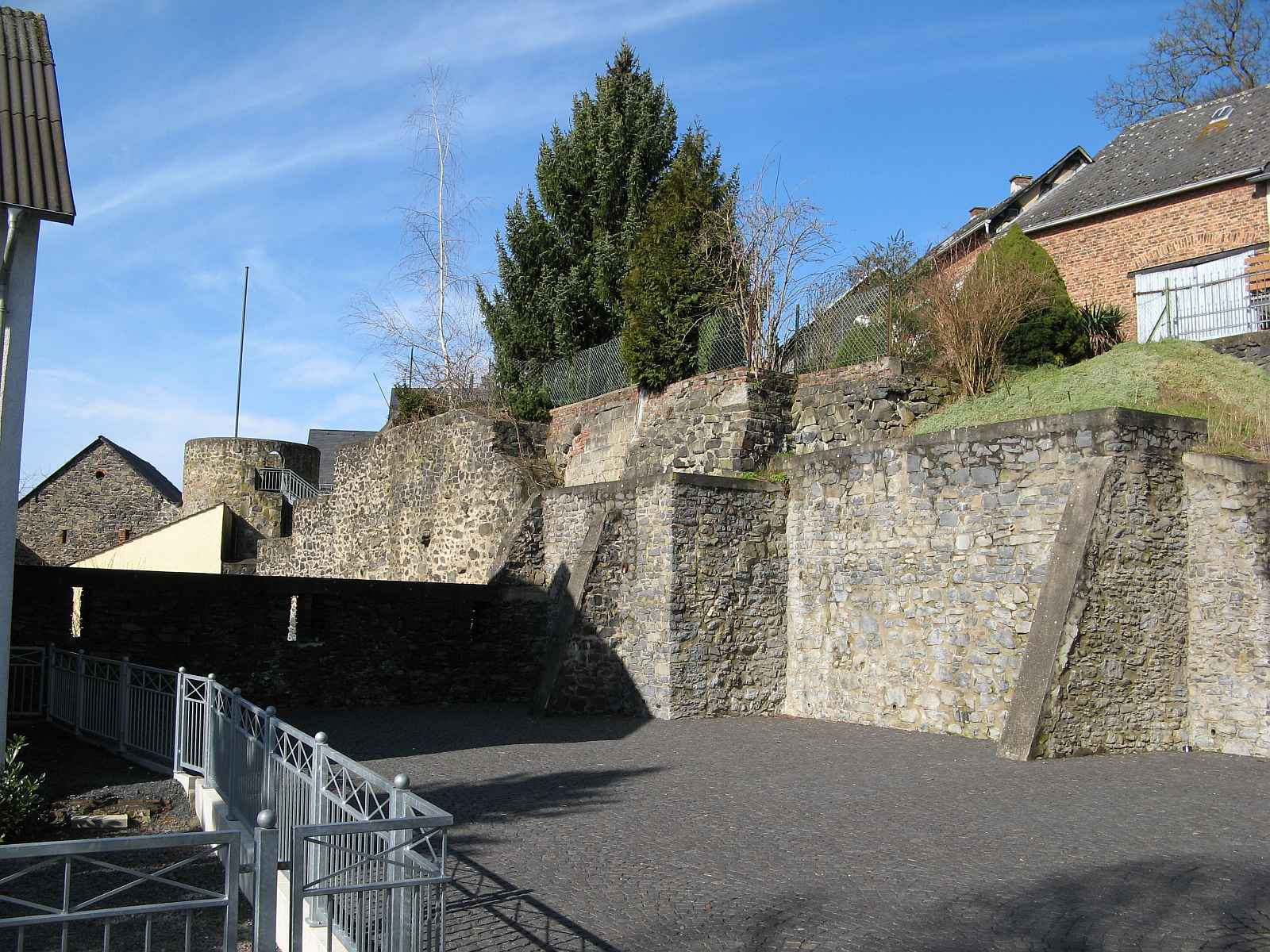 Reste der Stadtmauer von Ellar, Hessen, Deutschland